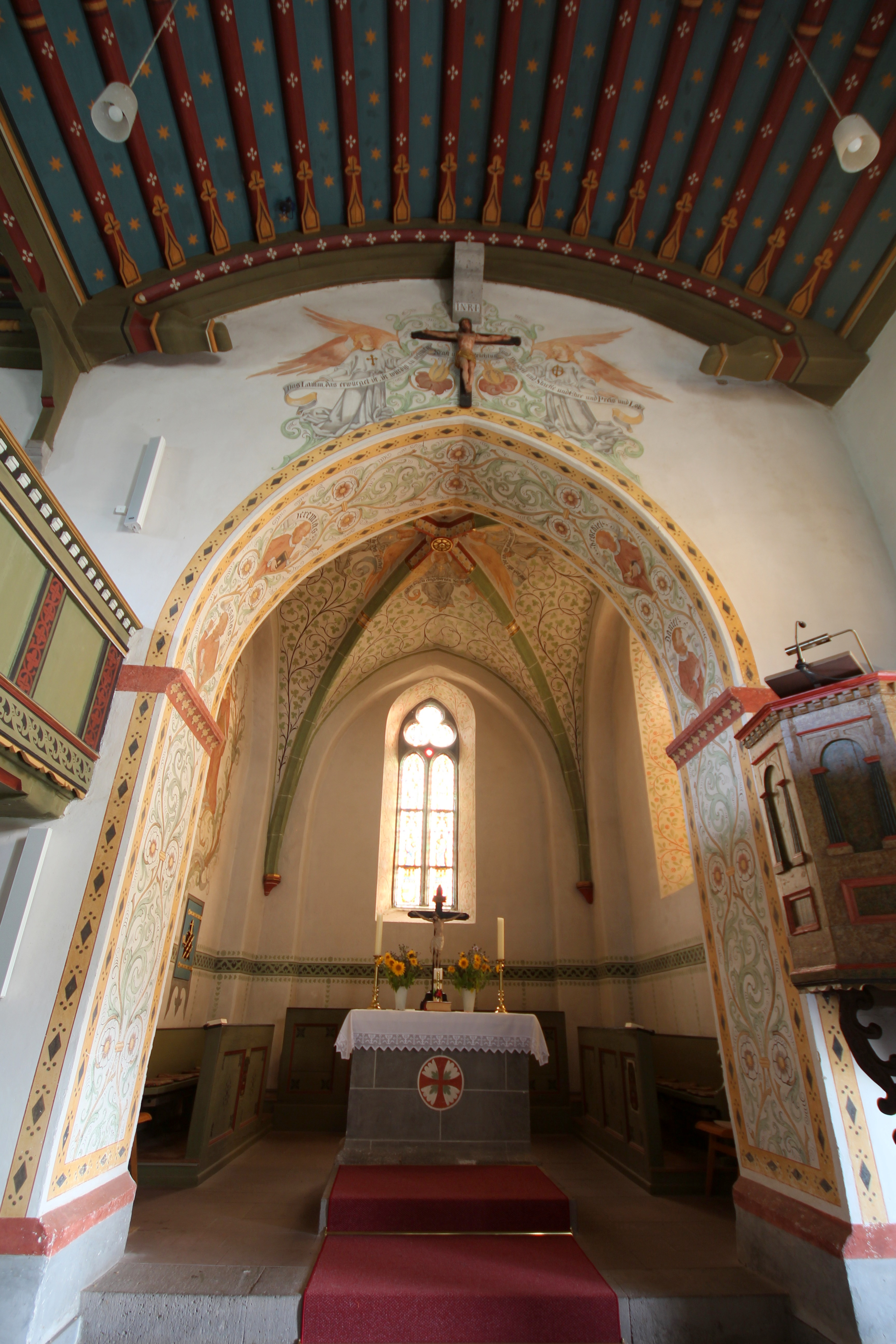 Orgel der Ev. Kirche Winnen, Allendorf/Lumda, Landkreis Gießen, Hessen, Deutschland